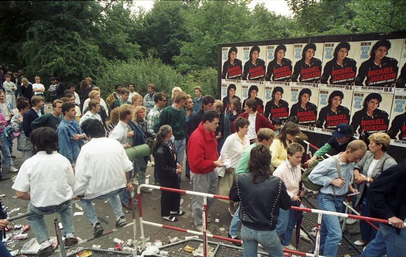 Juni 1988 Berlin (West), Junge Leute warten auf den Einlaß zum Michael Jackson Konzert vor dem Reichstag.